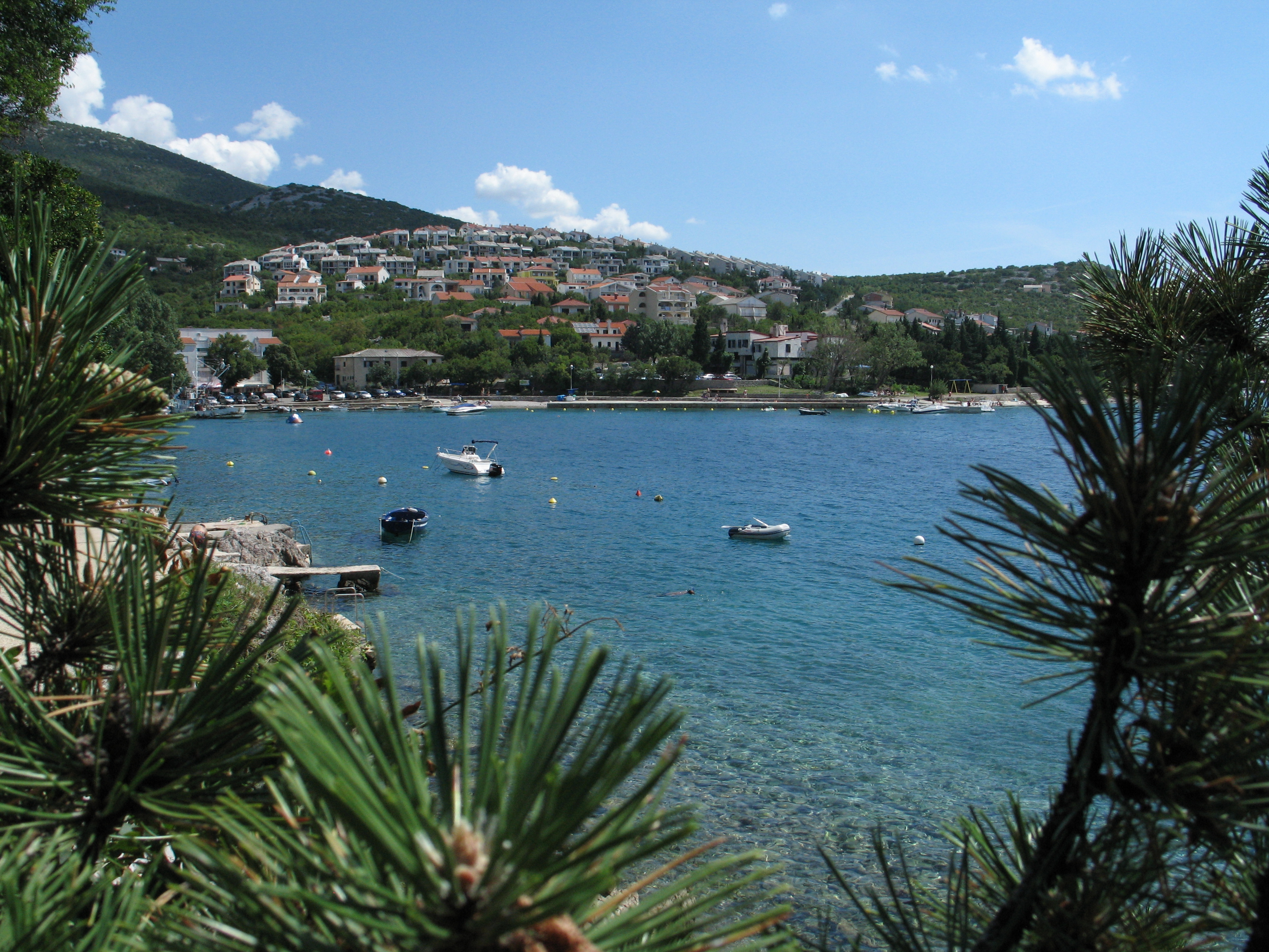 Pogled prema apartmanskom naselju